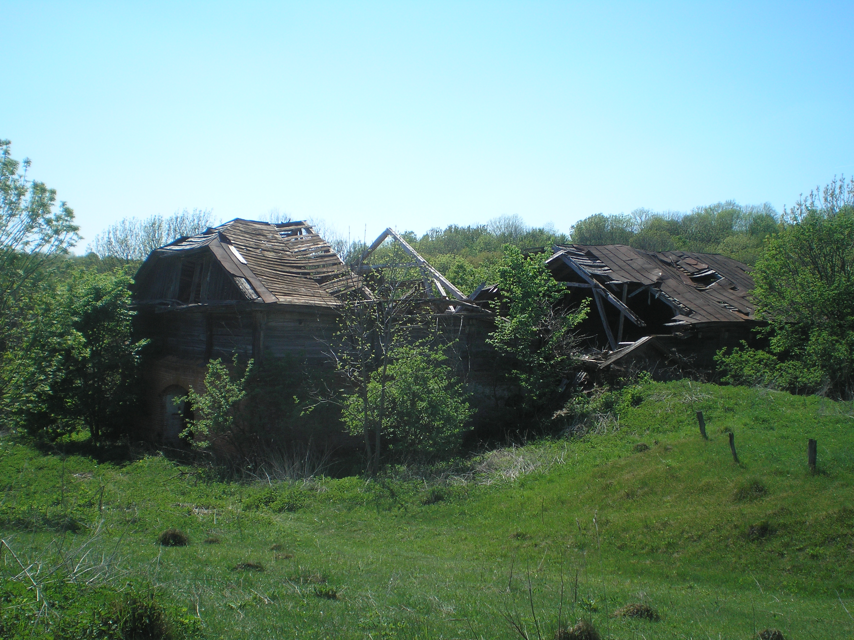 Конюшня в Рихлівському монастирі